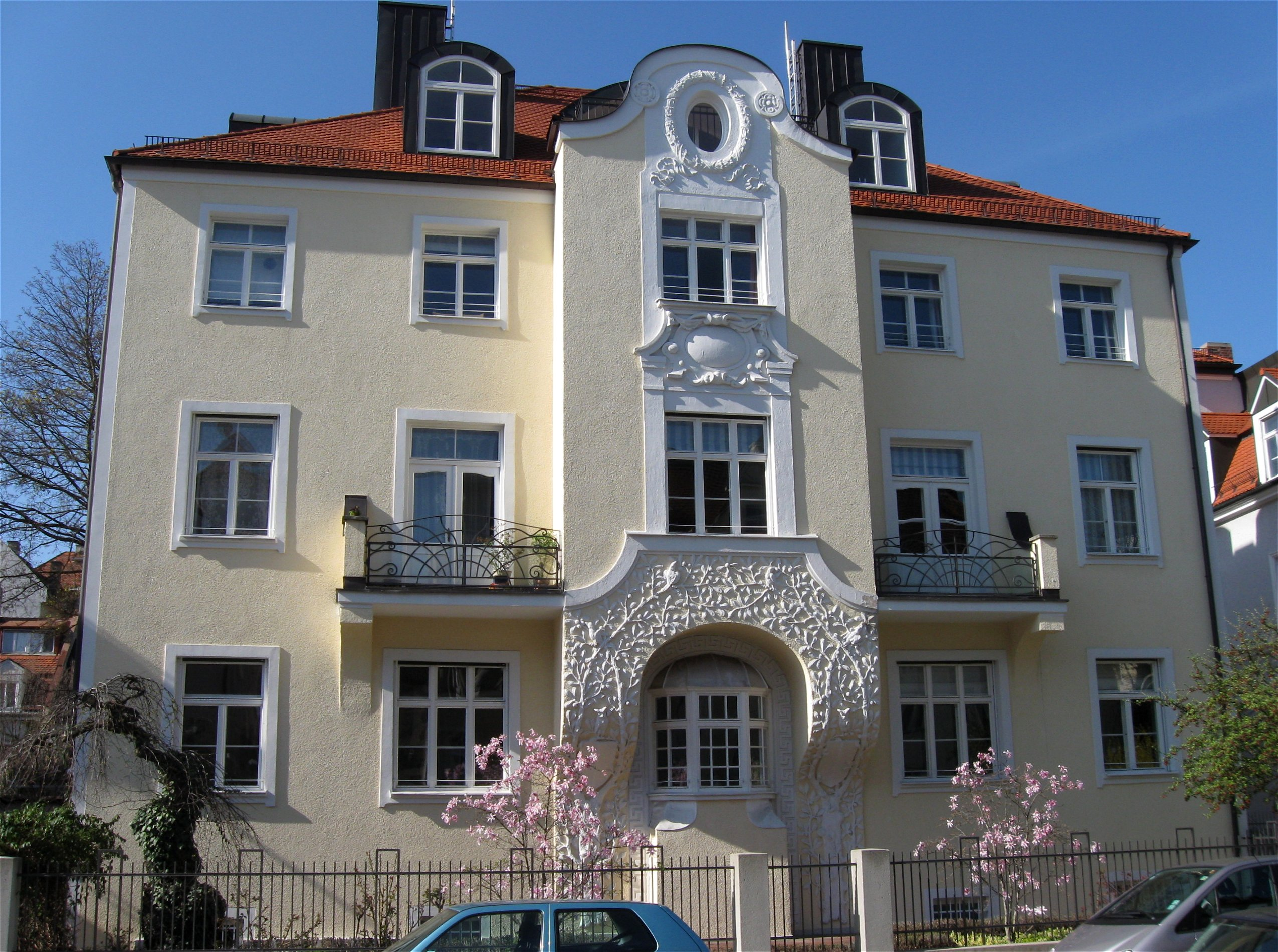 Bothmerstraße 7/9; Freistehendes Jugendstilhaus, dreigeschossig, mit Mittelerker zwischen Balkonen und reichem Stuck, Anfang 20. Jh.